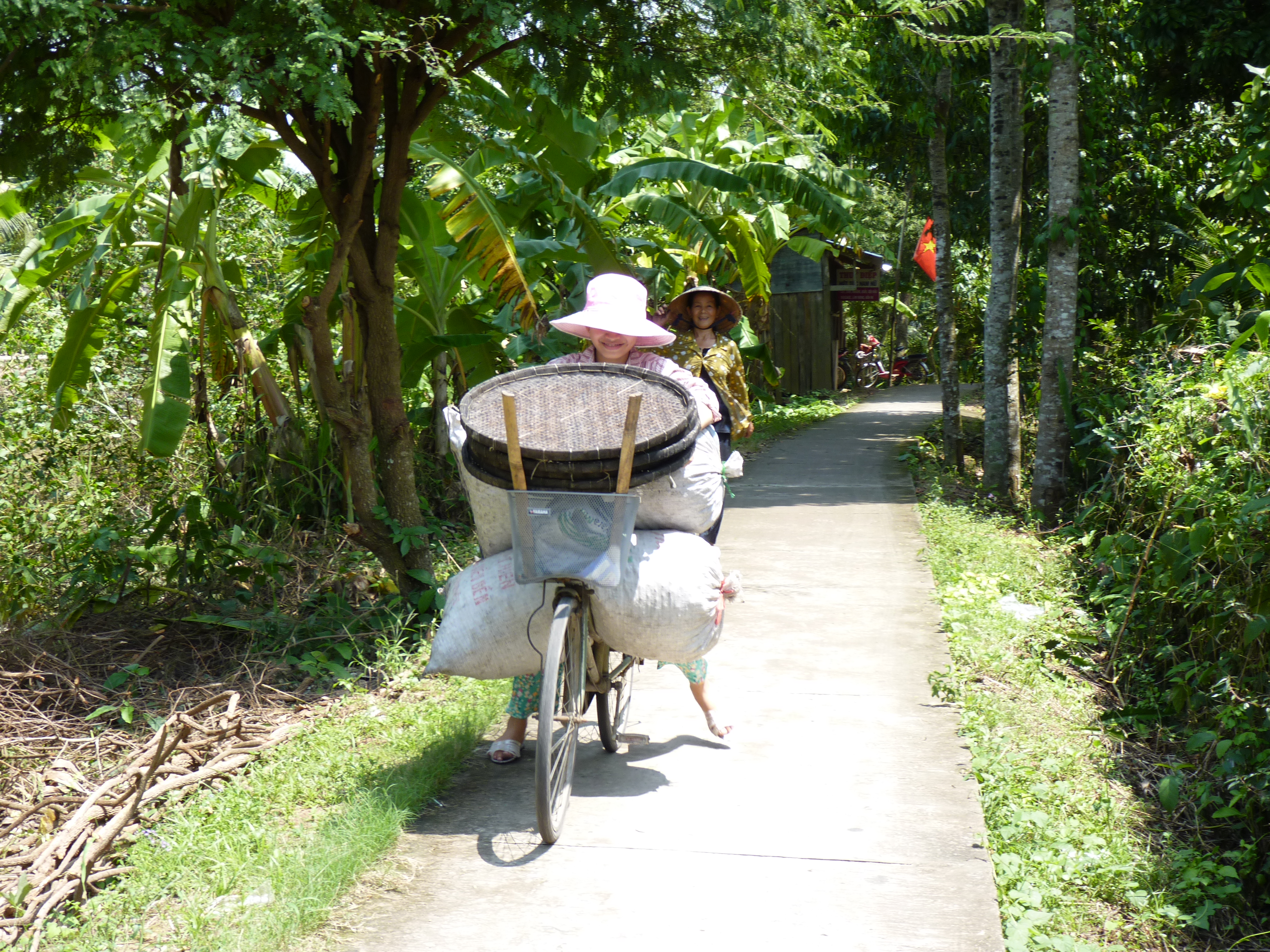 Cái Bè District, Tien Giang, Vietnam